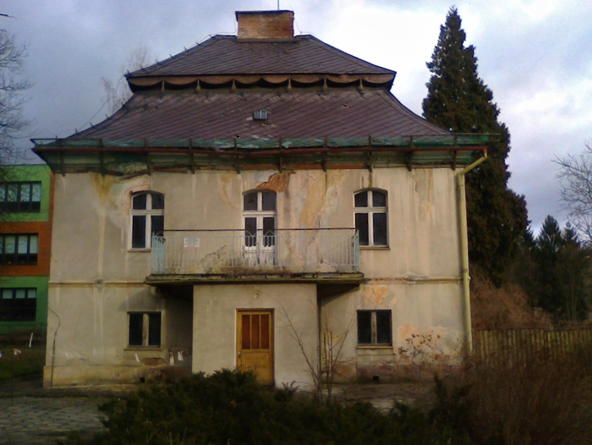 Bożków. Budynek w parku